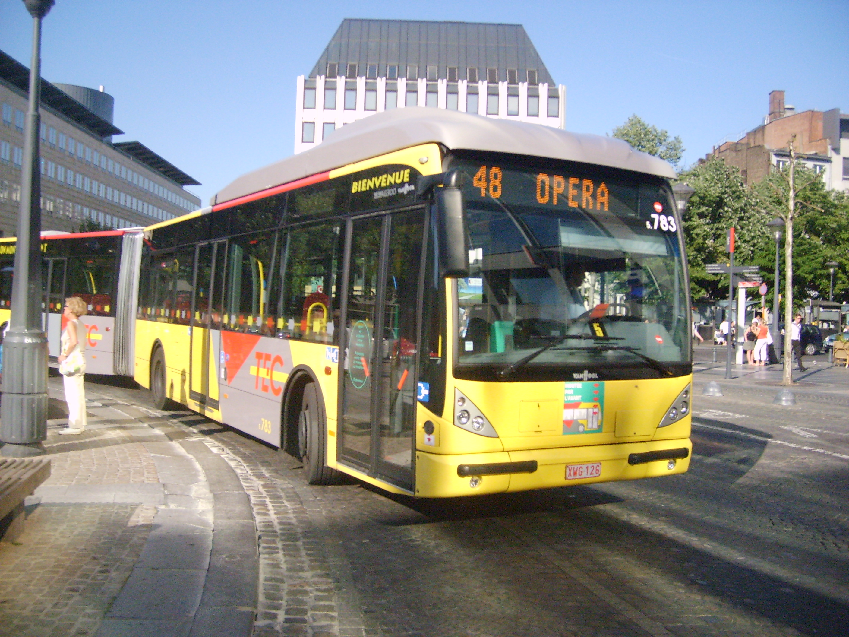 Van Hool AG300 new bus look du TEC Liège-Verviers (extérieur).